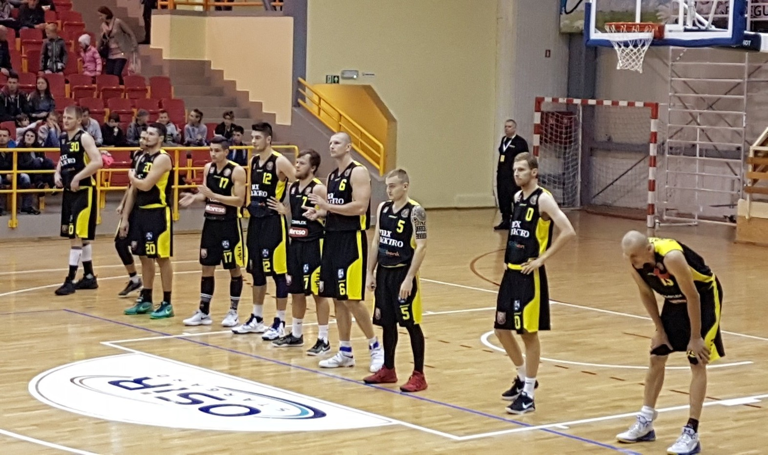 Sokół Łańcut